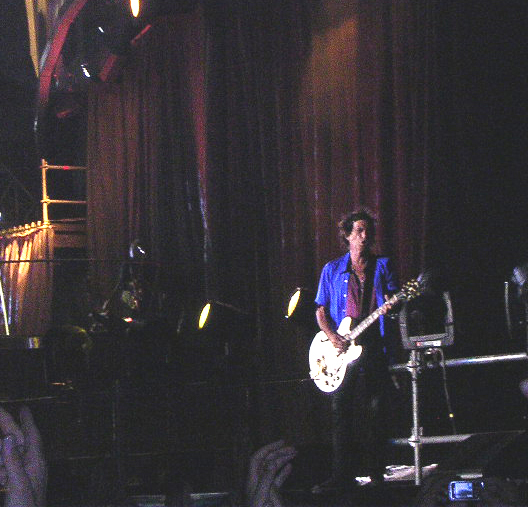 fotografia di Keith Richards durante il concerto di Nizza (Francia) del 8 agosto 2006